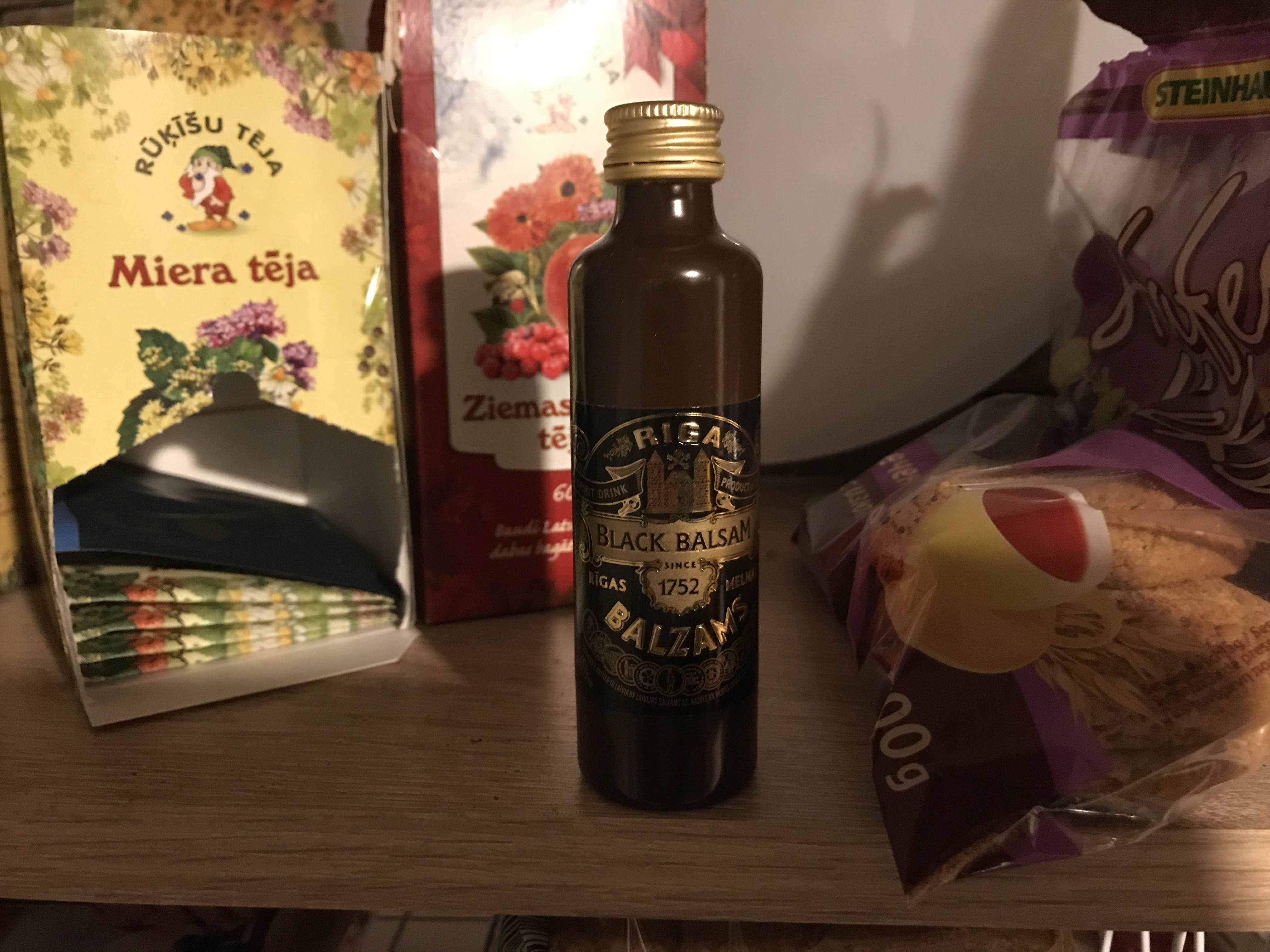 Bálsamo negro de Riga.